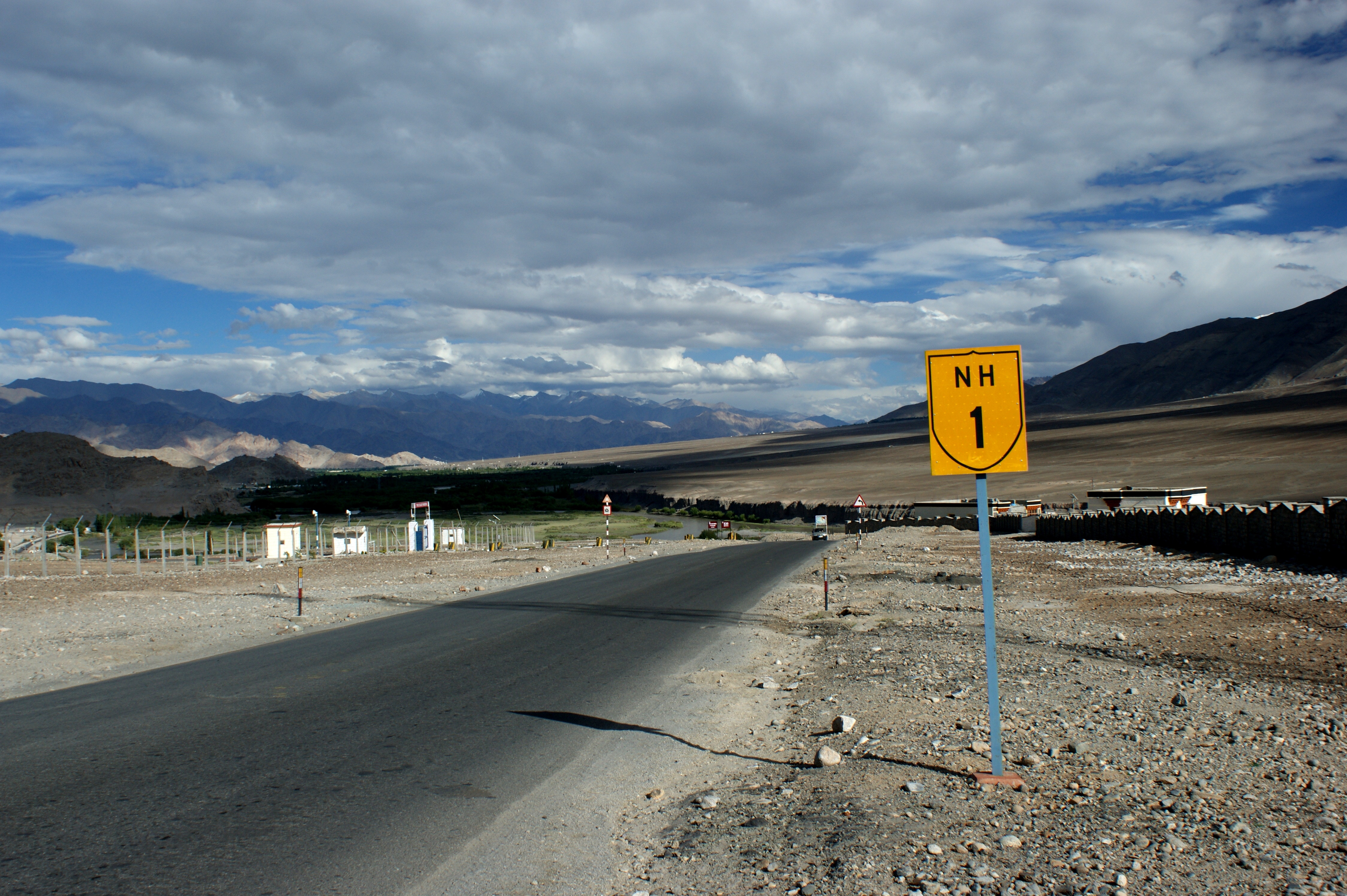 NH 1D kurz vor Leh, von Kargil kommend